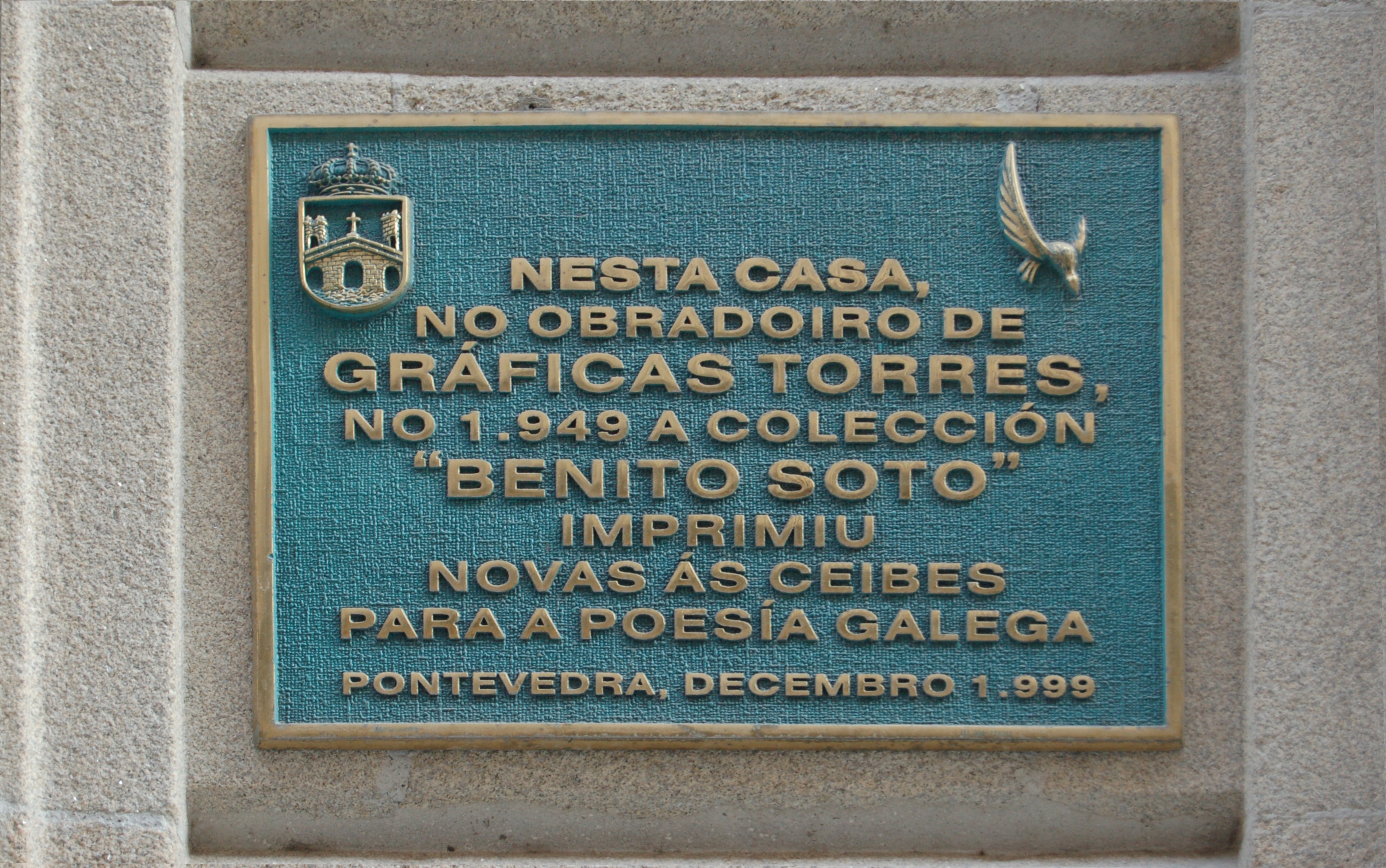 Placa na rúa de Don Filiberto de Pontevedra, no edificio onde estaba o obradoiro-imprenta de Gráficas Torres onde se imprimiu a colección Benito Soto.